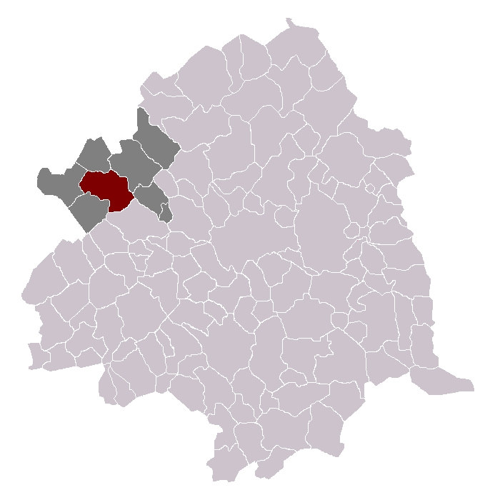 Chapelle d'Armentiere,dans son canton et son arrondissement